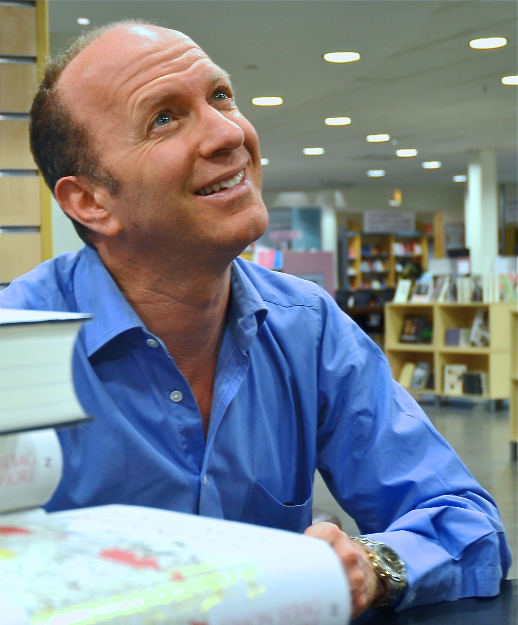 Simon Sebag Montefiore signerar böcker på Akademibokhandeln City i Stockholm 21 september 2011.